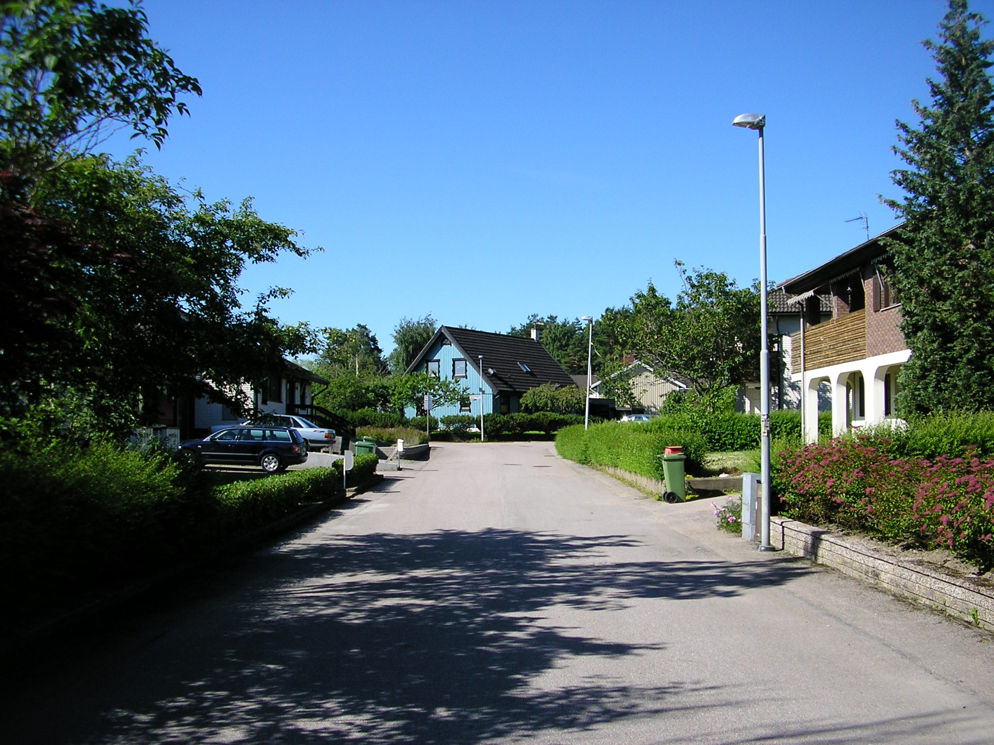 Ryttaregatan. Villabebyggelse på Onsjö, Vänersborg.